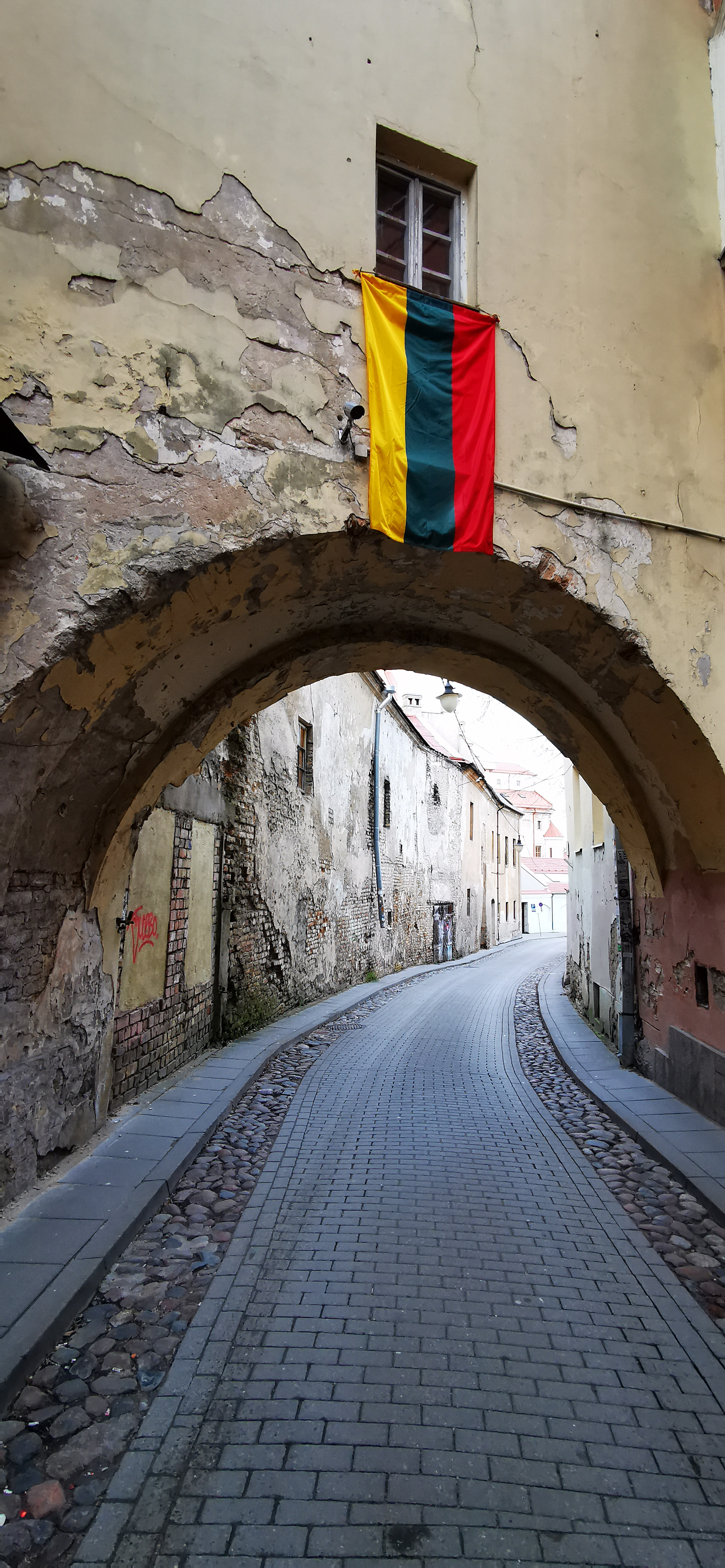 Šv. Kazimiero gatvė